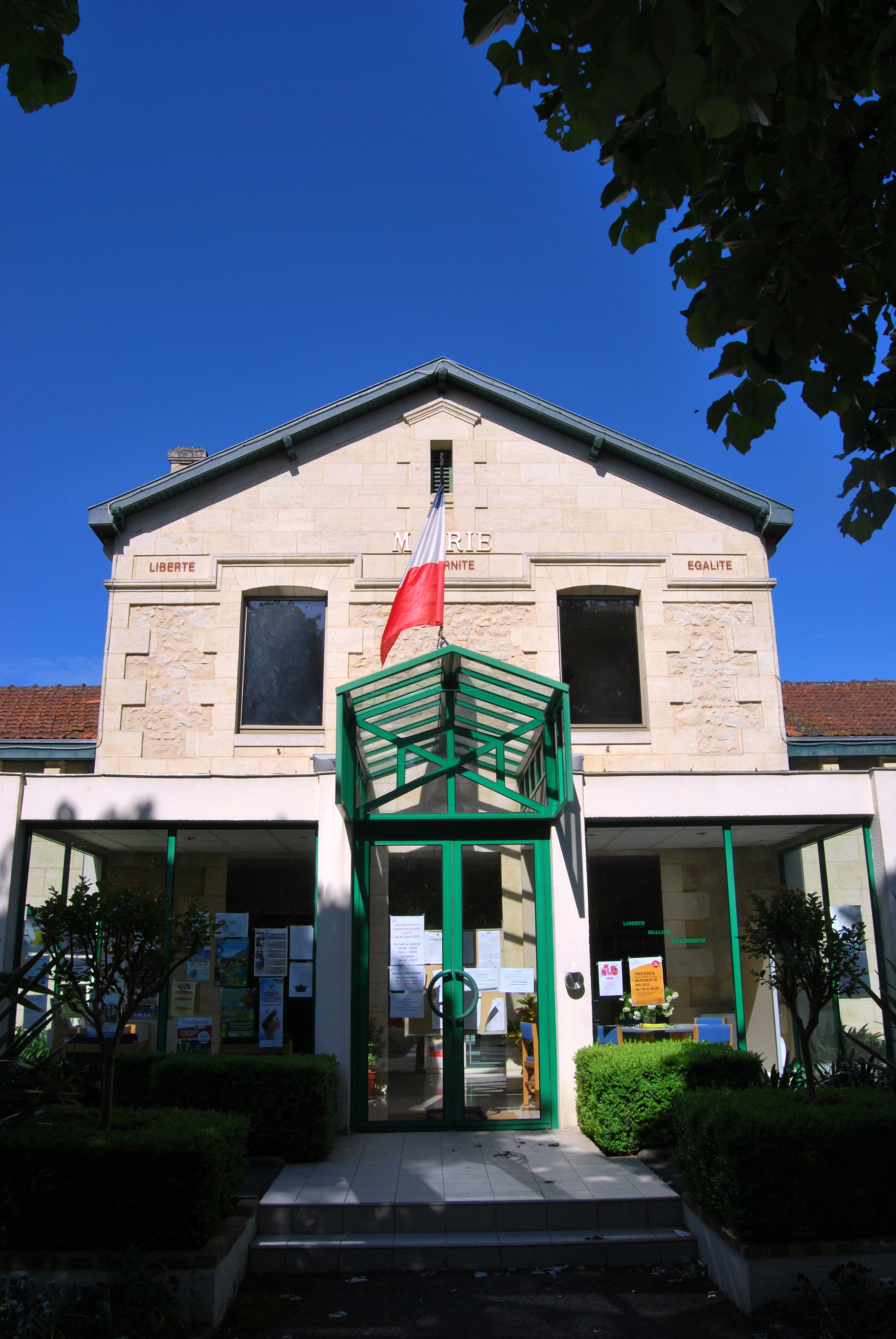 Salleboeuf Mairie